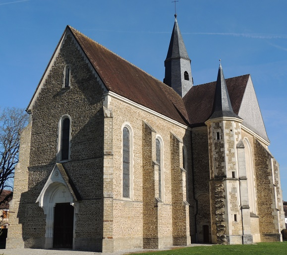 Église Saint-Jean-Baptiste, facade occidentale et transept sud avec une petite tour octogonale plus courte que le clocher